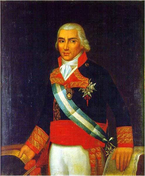 Retrato del marino español Federico Gravina (1756-1814), que fue capitán general de la Real Armada Española y caballero de la Orden de Santiago. El retratado aparece en pie, de medio cuerpo, y vistiendo uniforme pequeño de capitán general, que en aquella época era idéntico para el Ejército y la Armada. Además, aparece con las solapas abrochadas a la usanza y moda de la Armada, y luce la venera y la cruz de caballero de la Orden de Santiago, de la que era caballero, y la banda y la cruz de la Orden de Carlos III. Y el retrato fue pintado con toda probabilidad tras la muerte del teniente general.